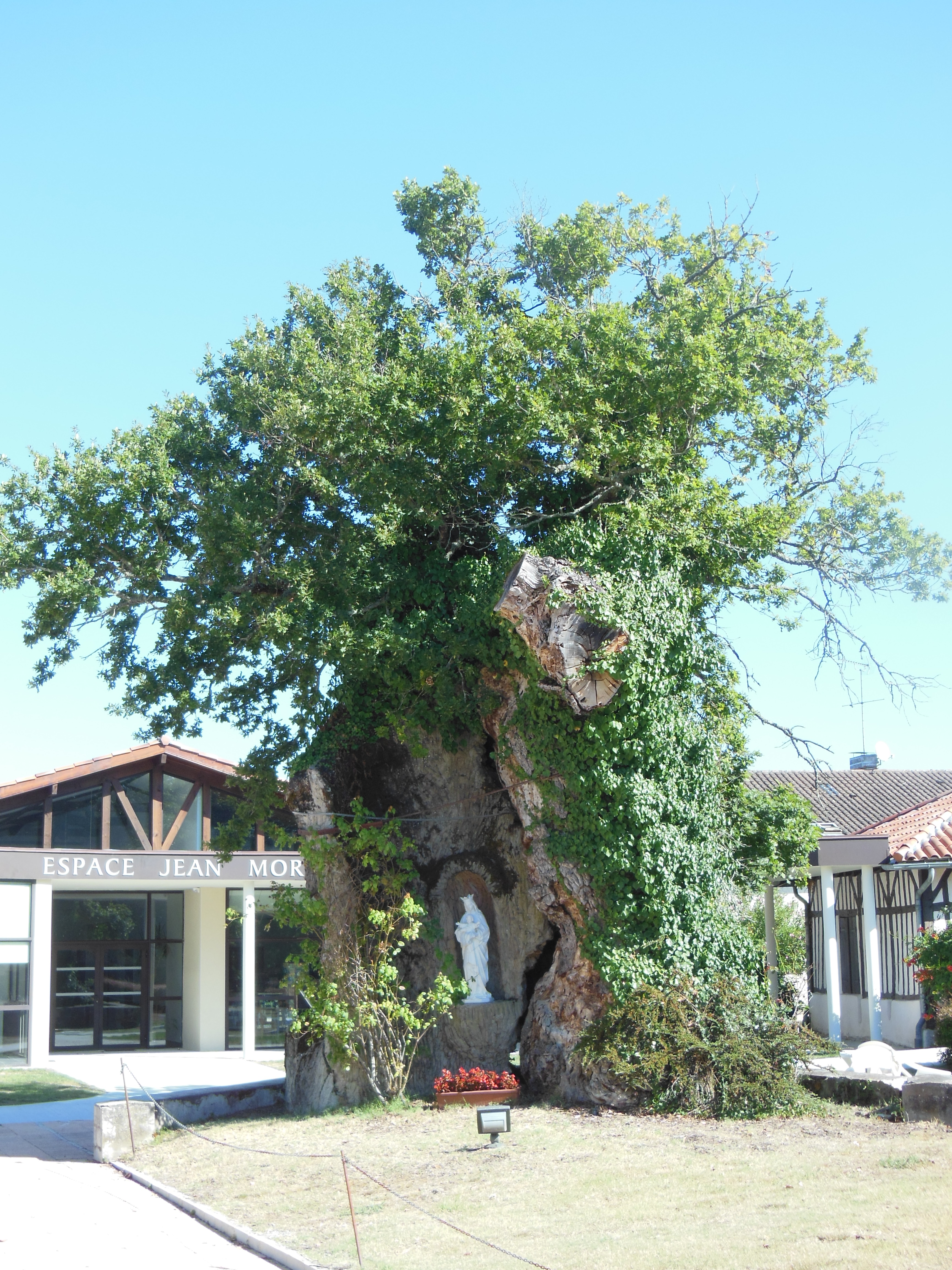 Ranquines, maison natale de Vincent de Paul (commune de Saint-Vincent-de-Paul, Landes, France). Chêne Lou bielh cassou, site classé en 1925